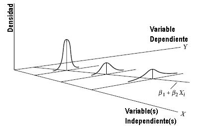 Distribucion de los errores sistematicos. Heterocedaticidad